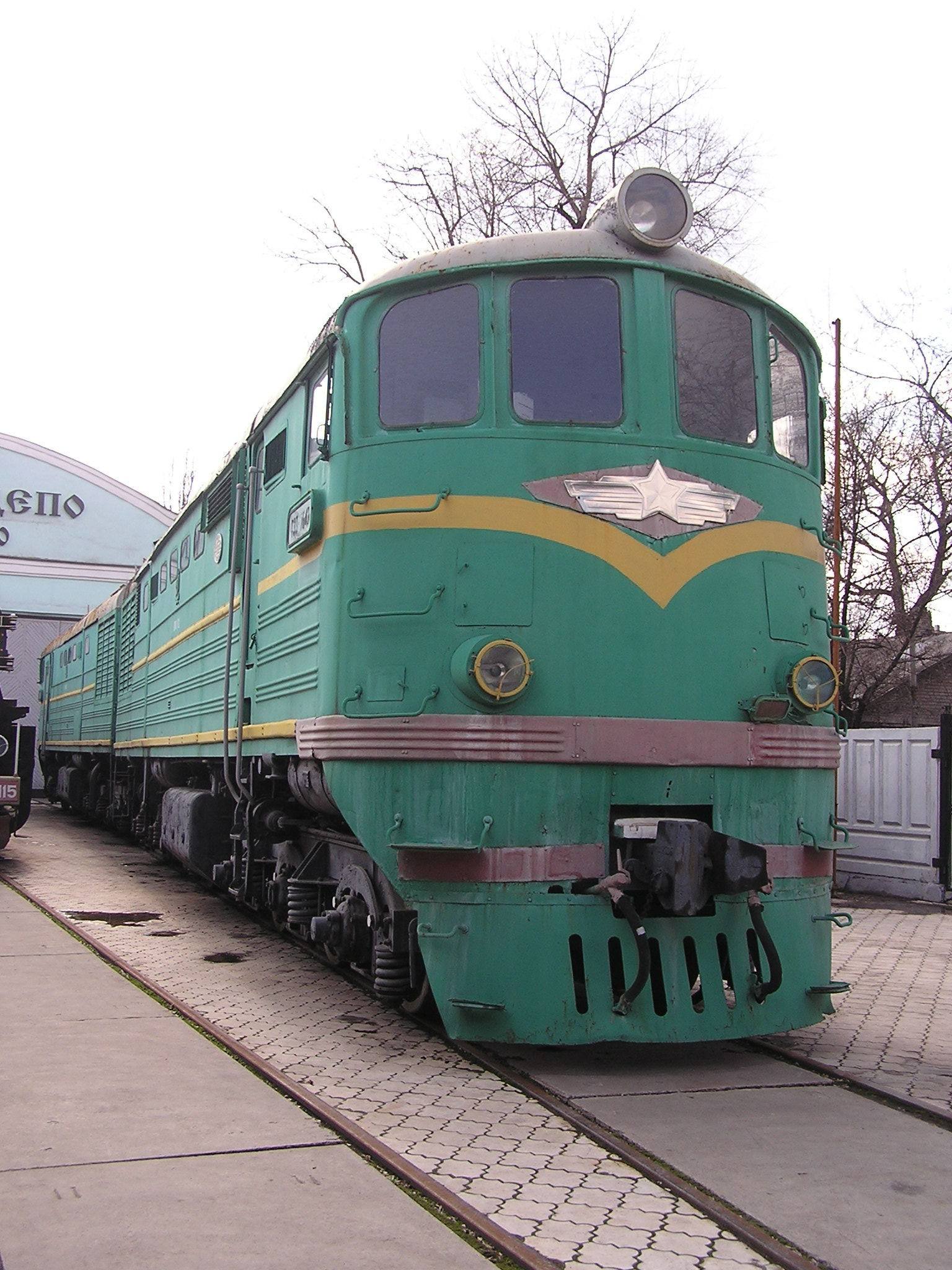 Музей истории и развития Донецкой Железной дороги. ТЭ3-7643